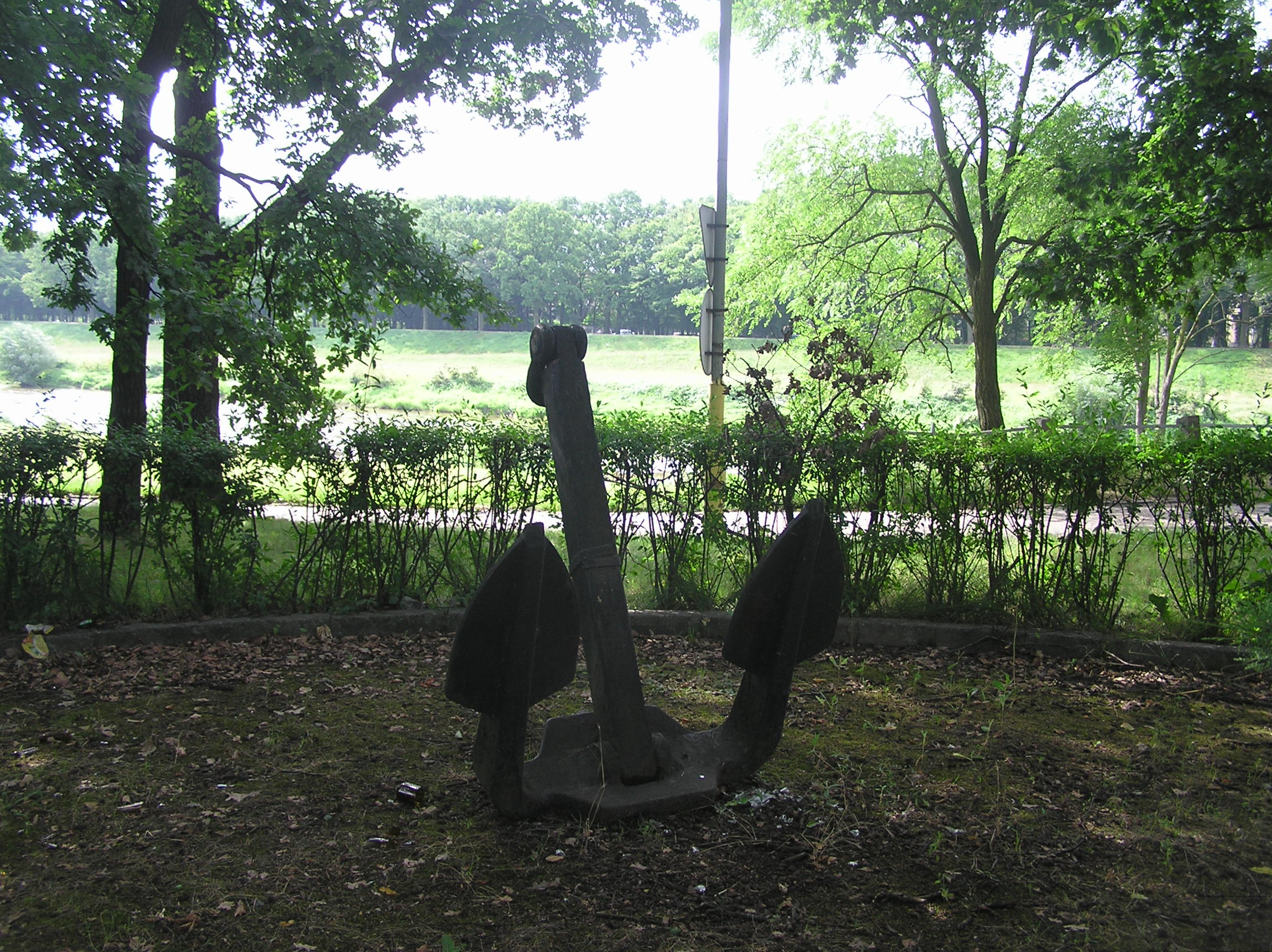 Pomnik Pracowników Odrzańskiej Drogi Wodnej